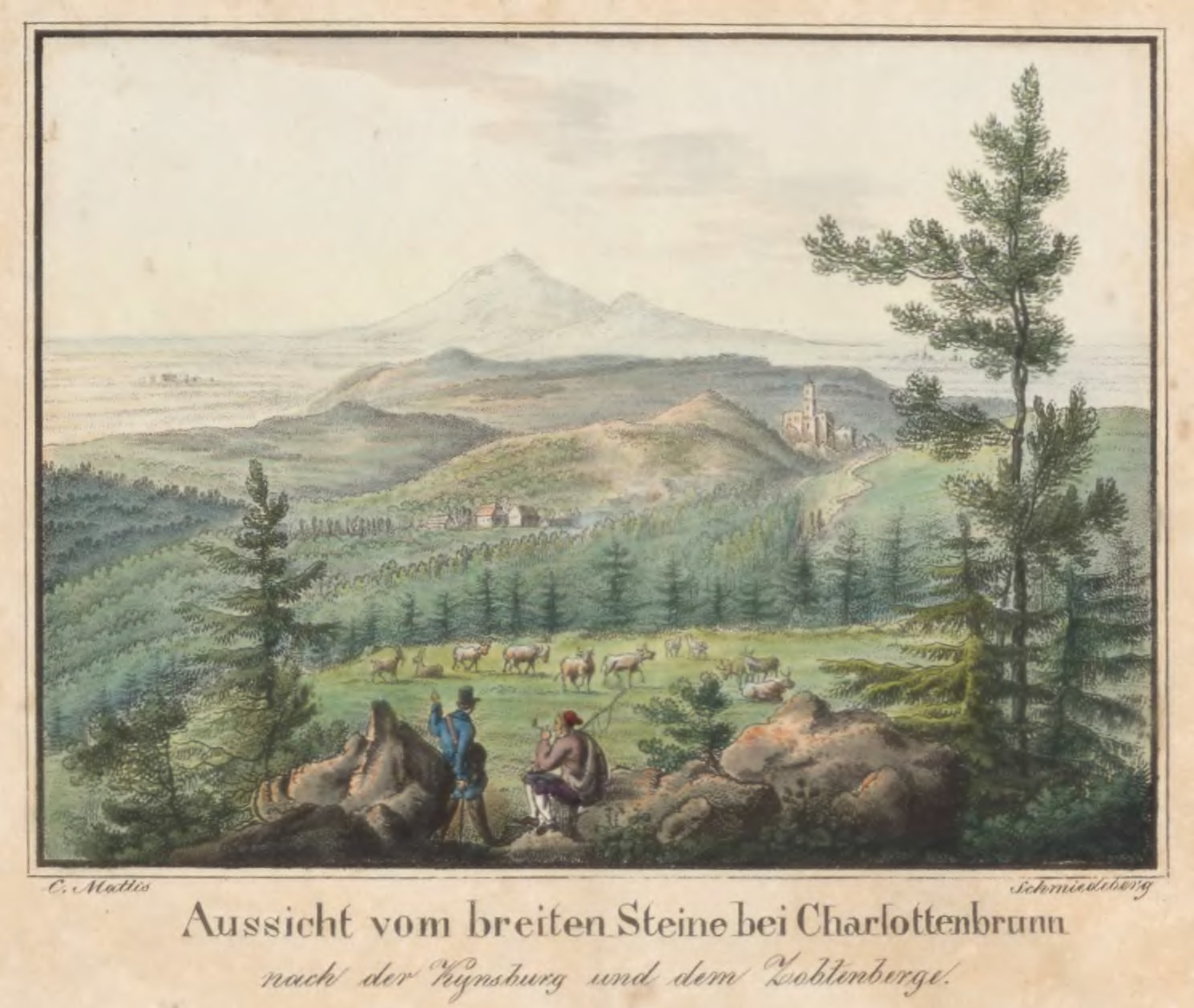 Aussicht vom breiten Steine bei Charlottenbrunn nach der Kynsburg und dem Zobtenberge von Carl Theodor Mattis, 87 x 118 mm